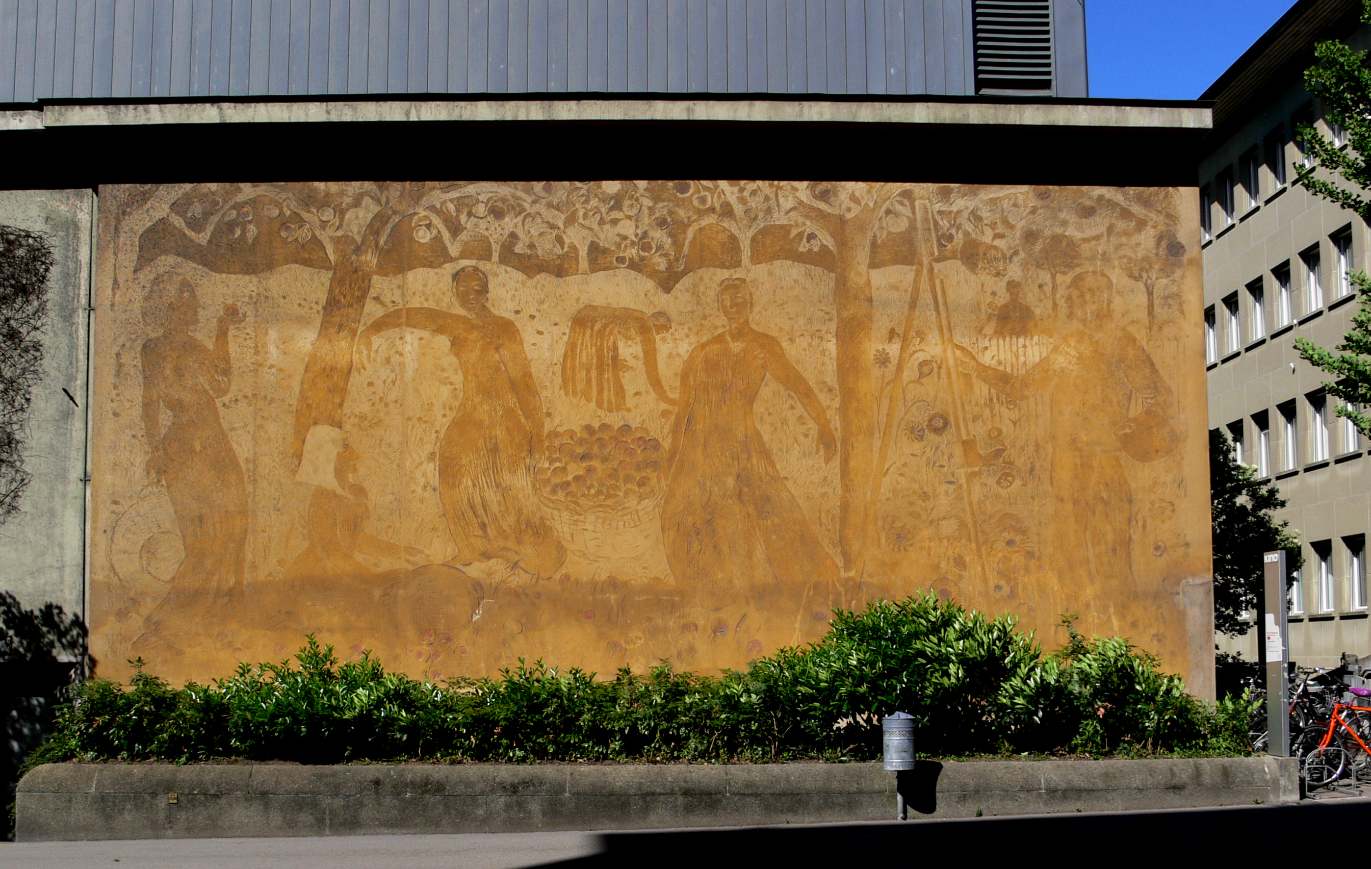 Kunstmuseum Bern, Fassadendetail des (bis auf diese Mauer Anfang der 1980er Jahren ersetzten) Neubaus von 1932–1936 Wanddekoration in Sgraffito von Cuno Amiet